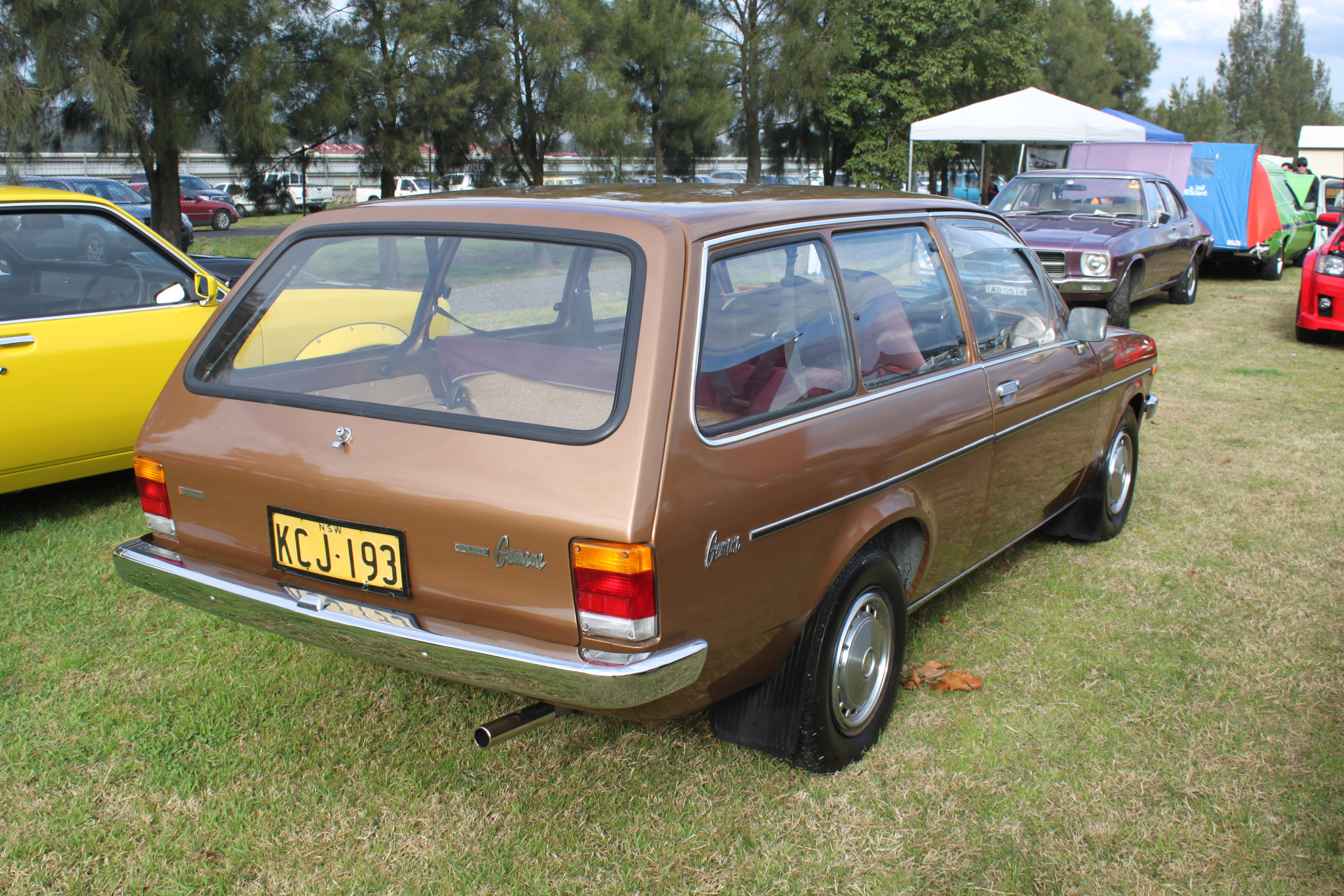 Holden Gemini TD Wagon